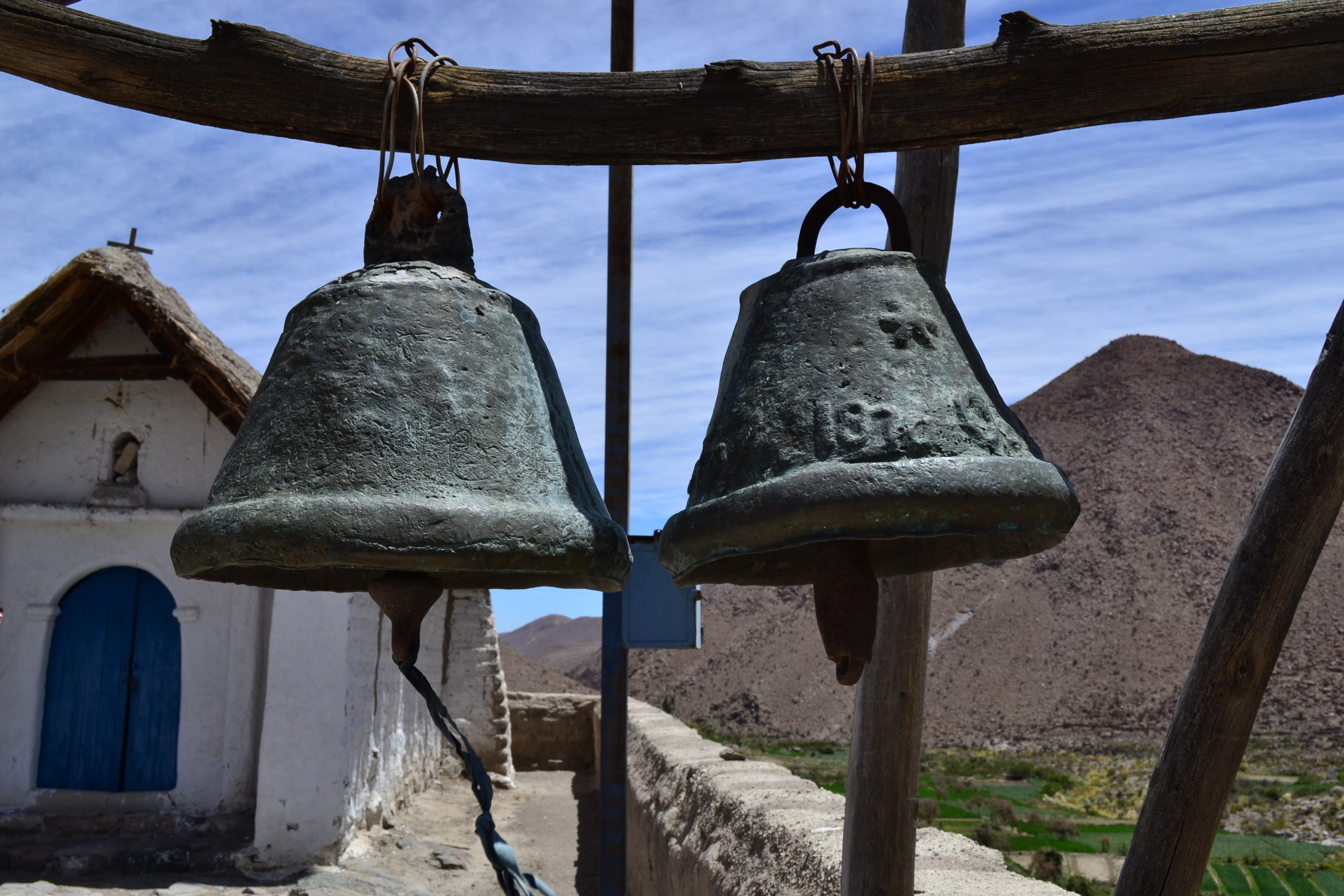 detalle de las campanas de la Capilla de Nama. This is a photo of a national monument in Chile: 2058